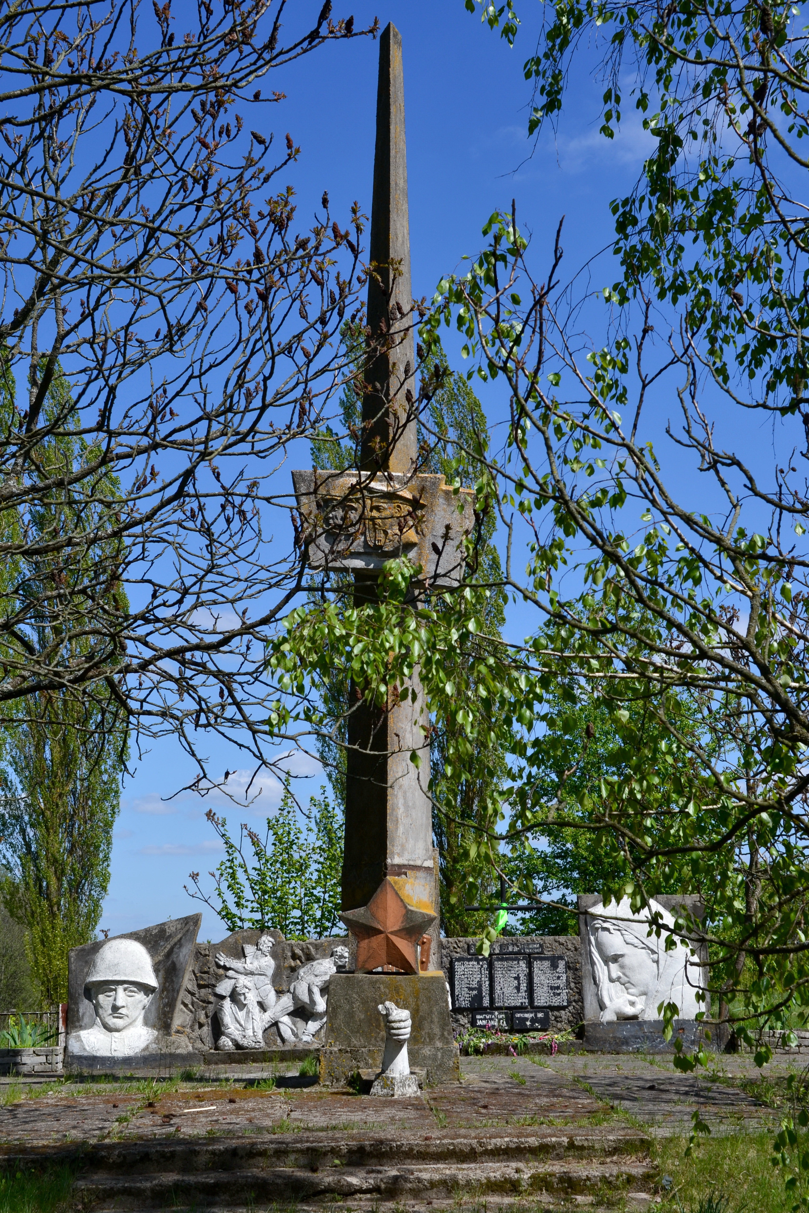 Пам'ятник на честь загиблих воїнів с. Озденіж та с. Іванчиці - загальний вигляд - Іванчиці (в південній частині села) Рожищенський район Волинська область Україна